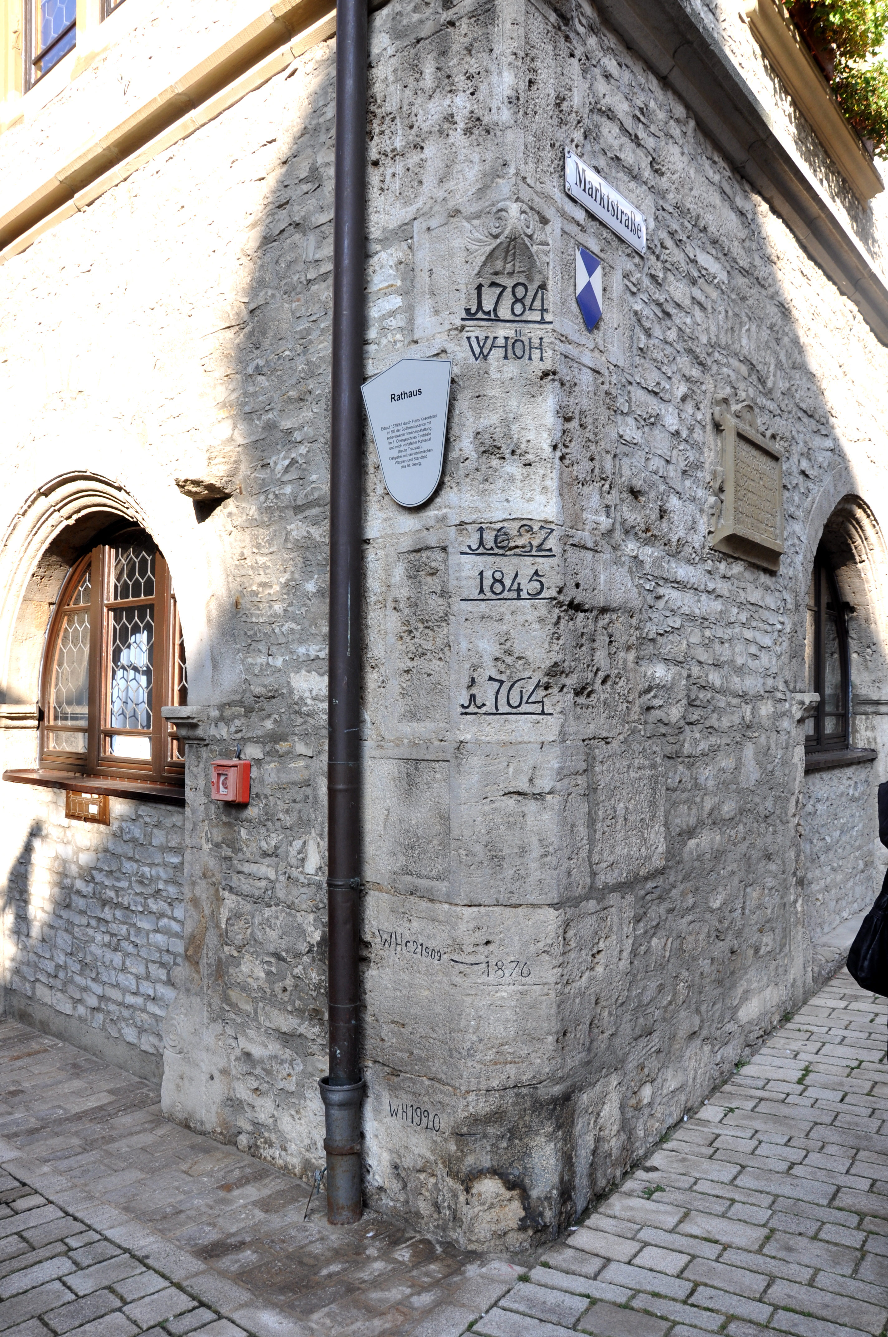 Marktbreit, Rathaus, Hausecke mit Flutpegelmarken